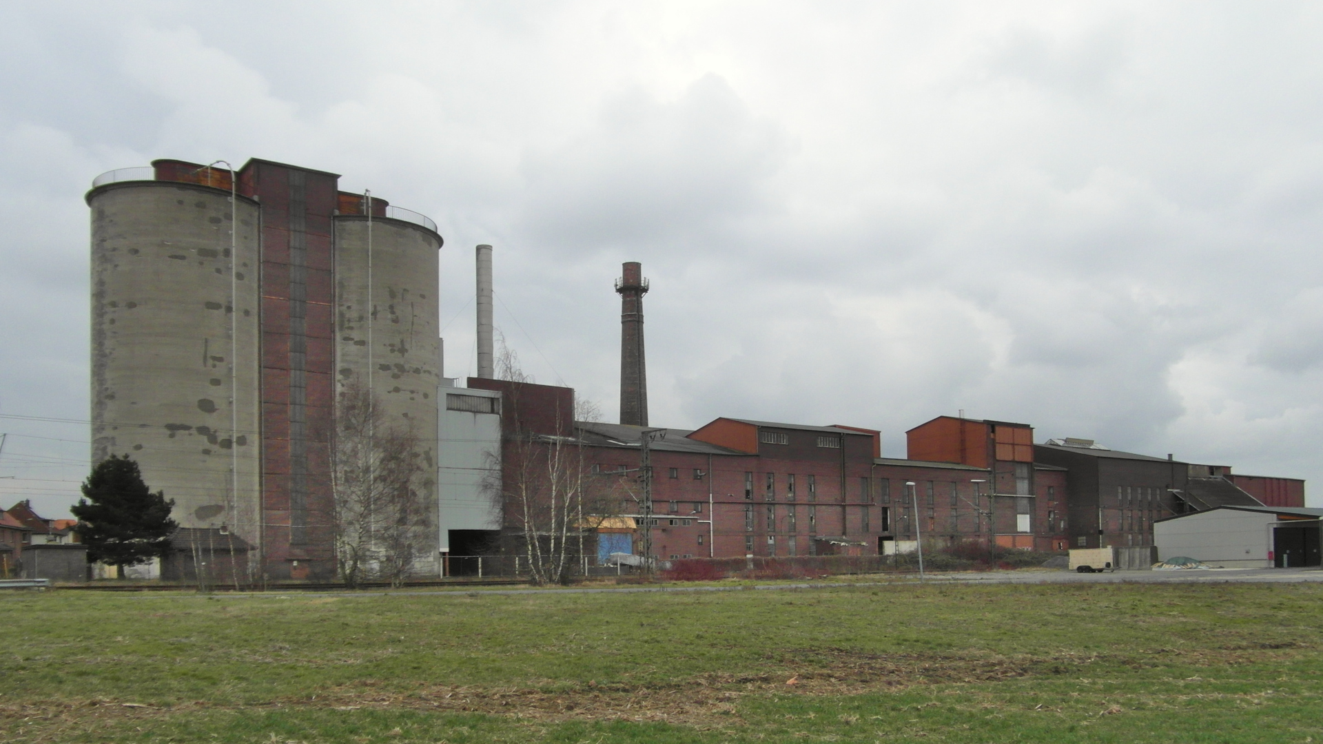 2017 stand die Zuckerfabrik Weetzen noch, bis auf die Silos seit Jahrzehnten ungenutzt.